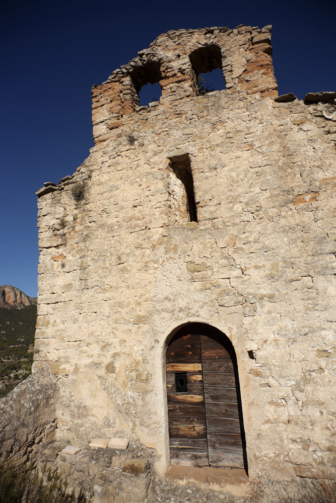 Ermita de Sant Just, al sud de La Valldan, municipi d'Odèn